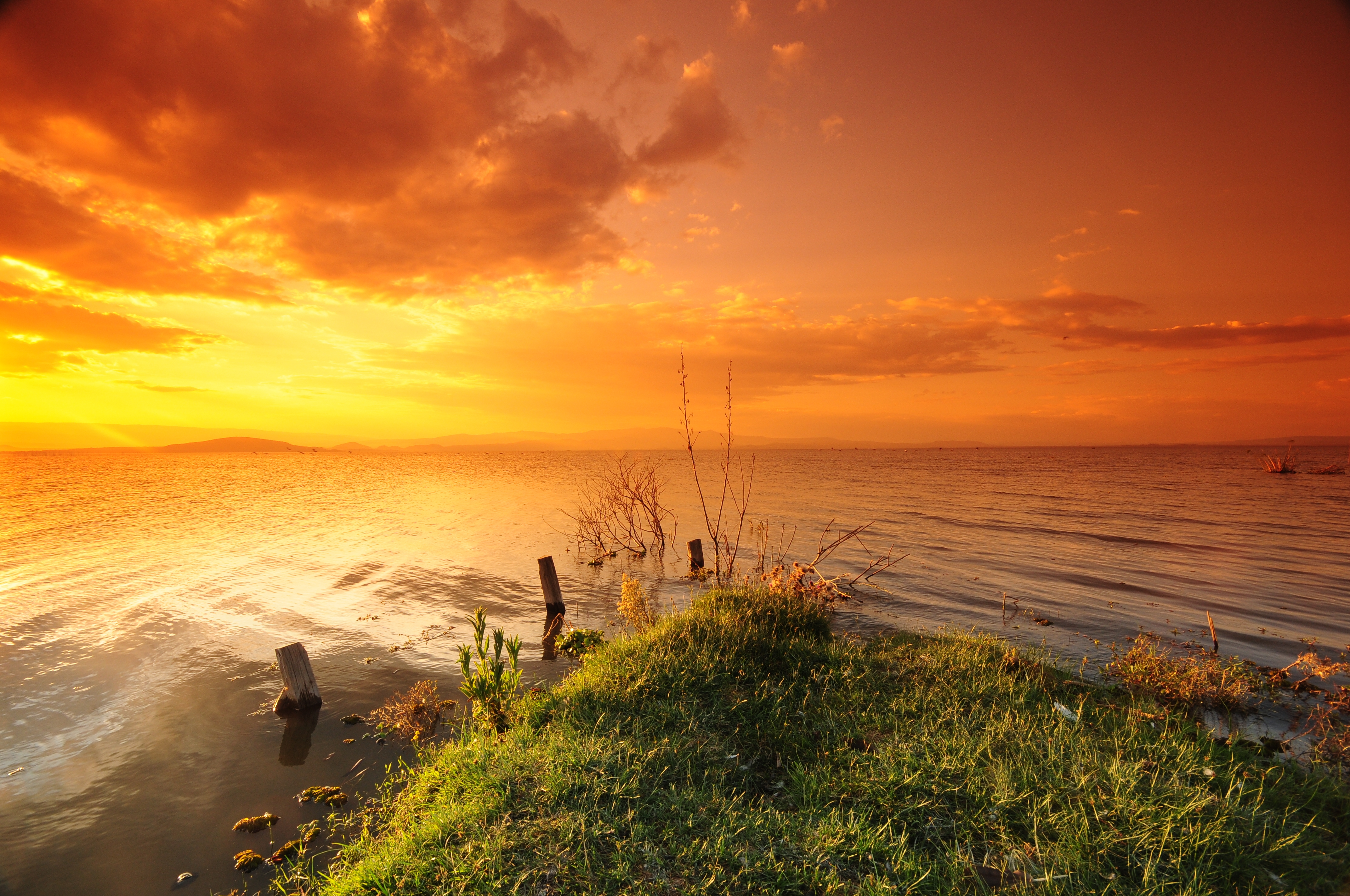 Lake Naivasha Sunset